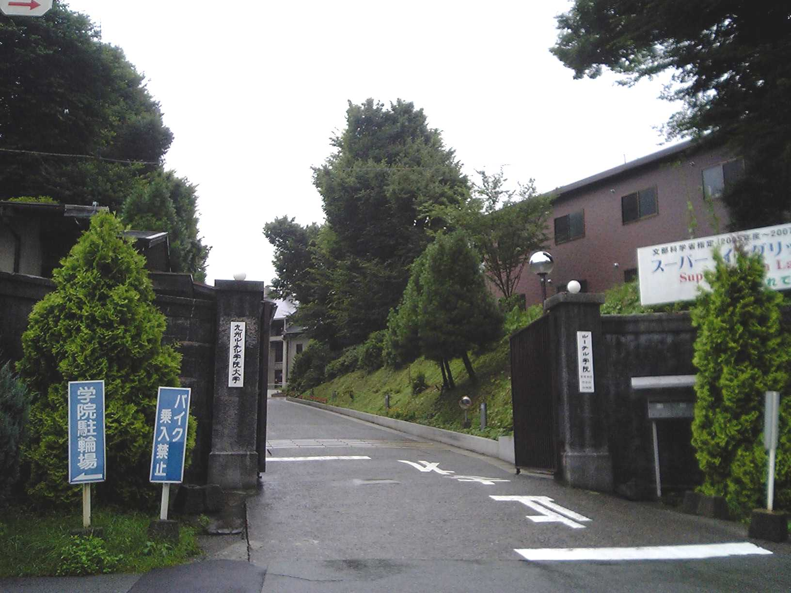 九州ルーテル学院大学2007年7月7日投稿者が撮影